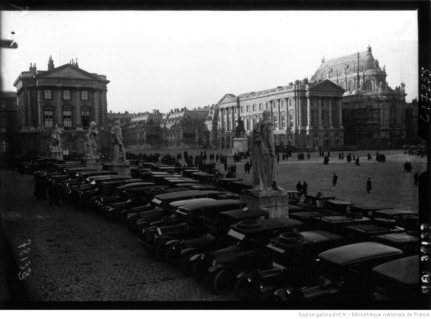 Versailles : élection présidentielle : les autos dans la cour du palais : [photographie de presse] / Agence Meurisse